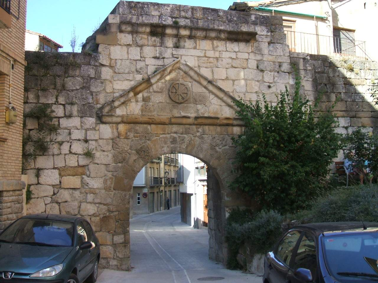 Estella - Portal de Castilla